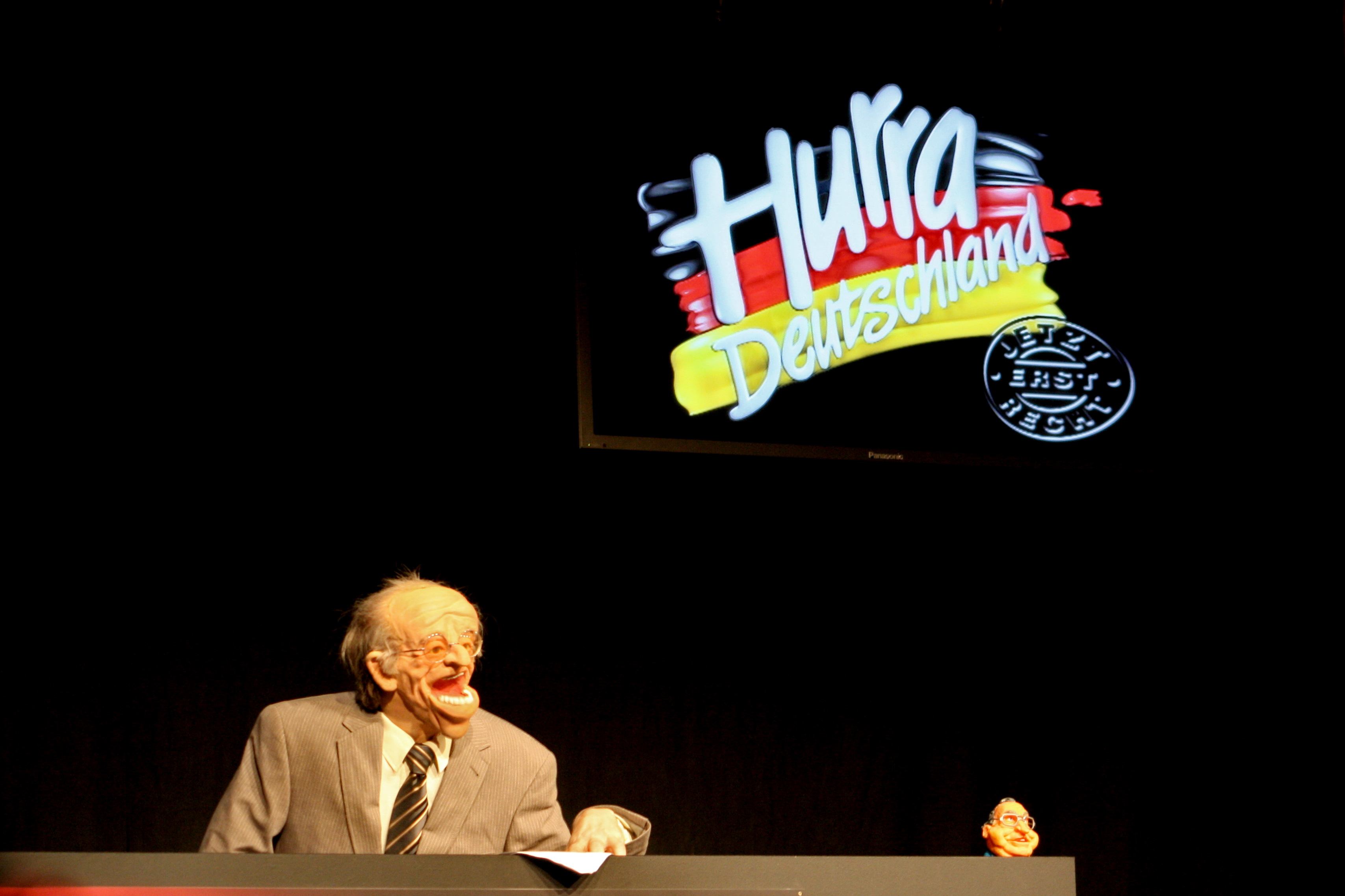 Biolek